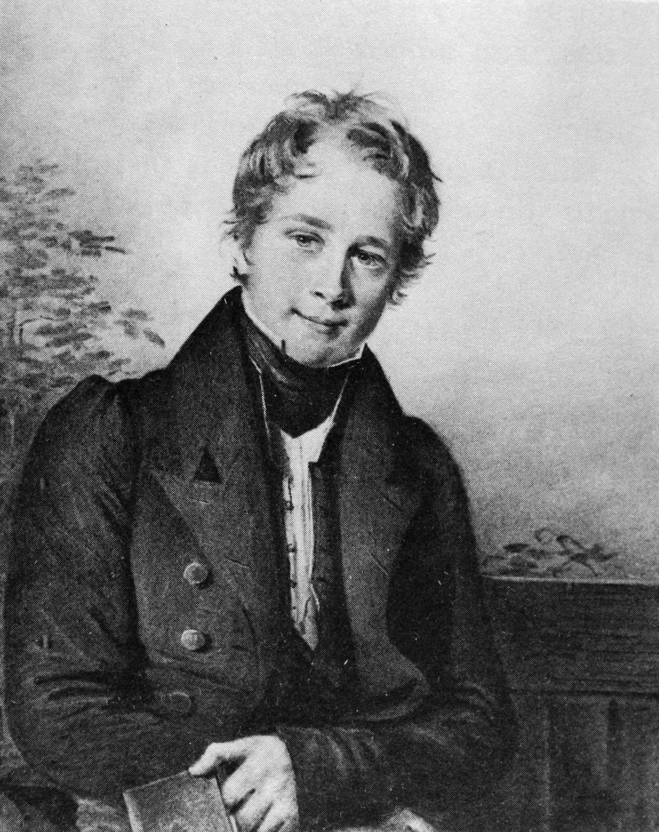 François-Jules Pictet à lâge de 21, crayon, 190x160mm